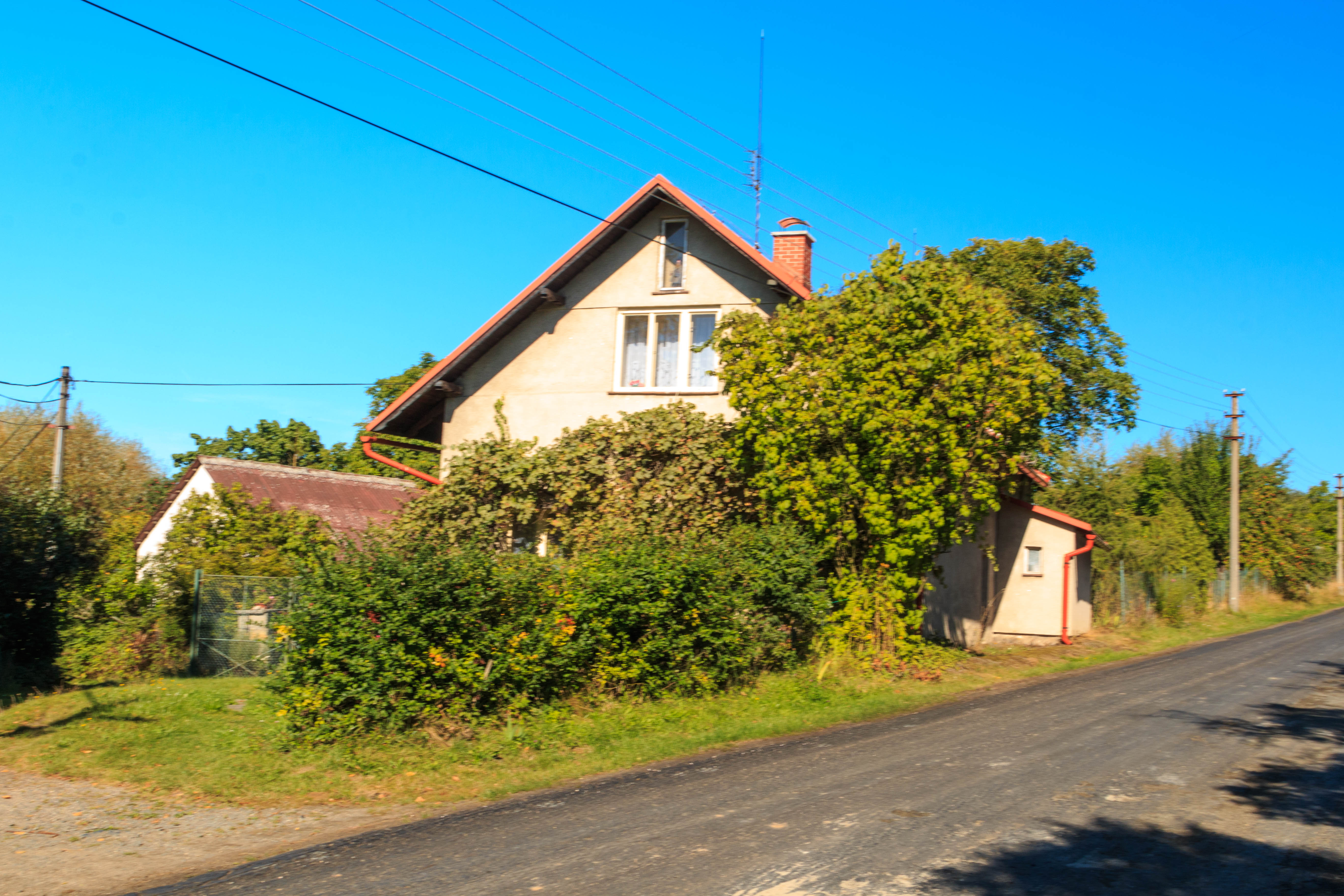 Jivina čp. 5